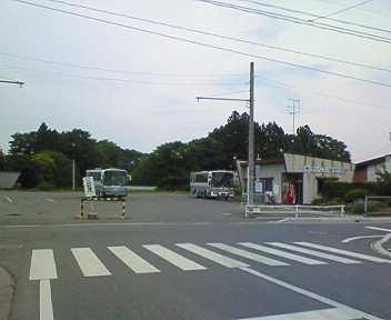 八戸市営バス是川団地バスプール 一部の便はja:南部バス：是川団地線（支所前経由）がこのバスプール内から発車する。ただしja:るるっぷ八戸ではバスプールには乗り入れず、近くの降車専用ポールの隣接地にある、るるっぷ専用のバス停ポール（ただし南部バスの通常バス停ポール）に停車する。